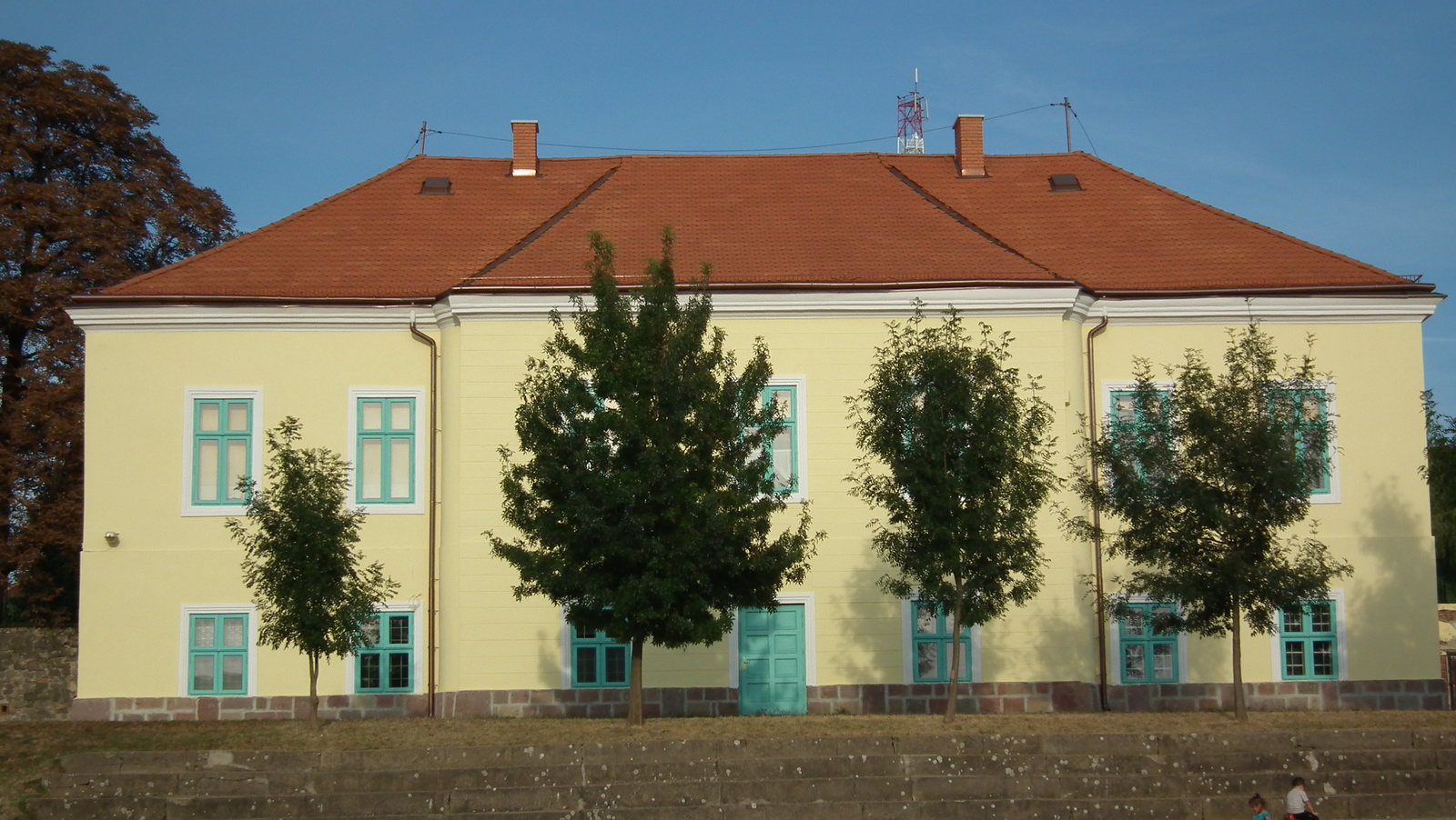 Volt Rhédey-kastély, most Óvoda-napközi. Barokk, 18. sz. - Borsod-Abaúj-Zemplén m., Emőd, Rákóczi u. 36., Kossuth Lajos u. 87..) This is a photo of a monument in Hungary. Identifier: 2733